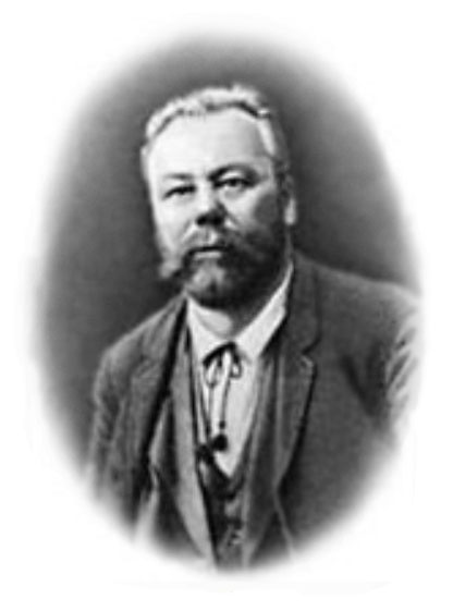 Иван Кузьмич Кондратьев (? – 1904) русский поэт, песенник, писатель, переводчик, историк, краевед.